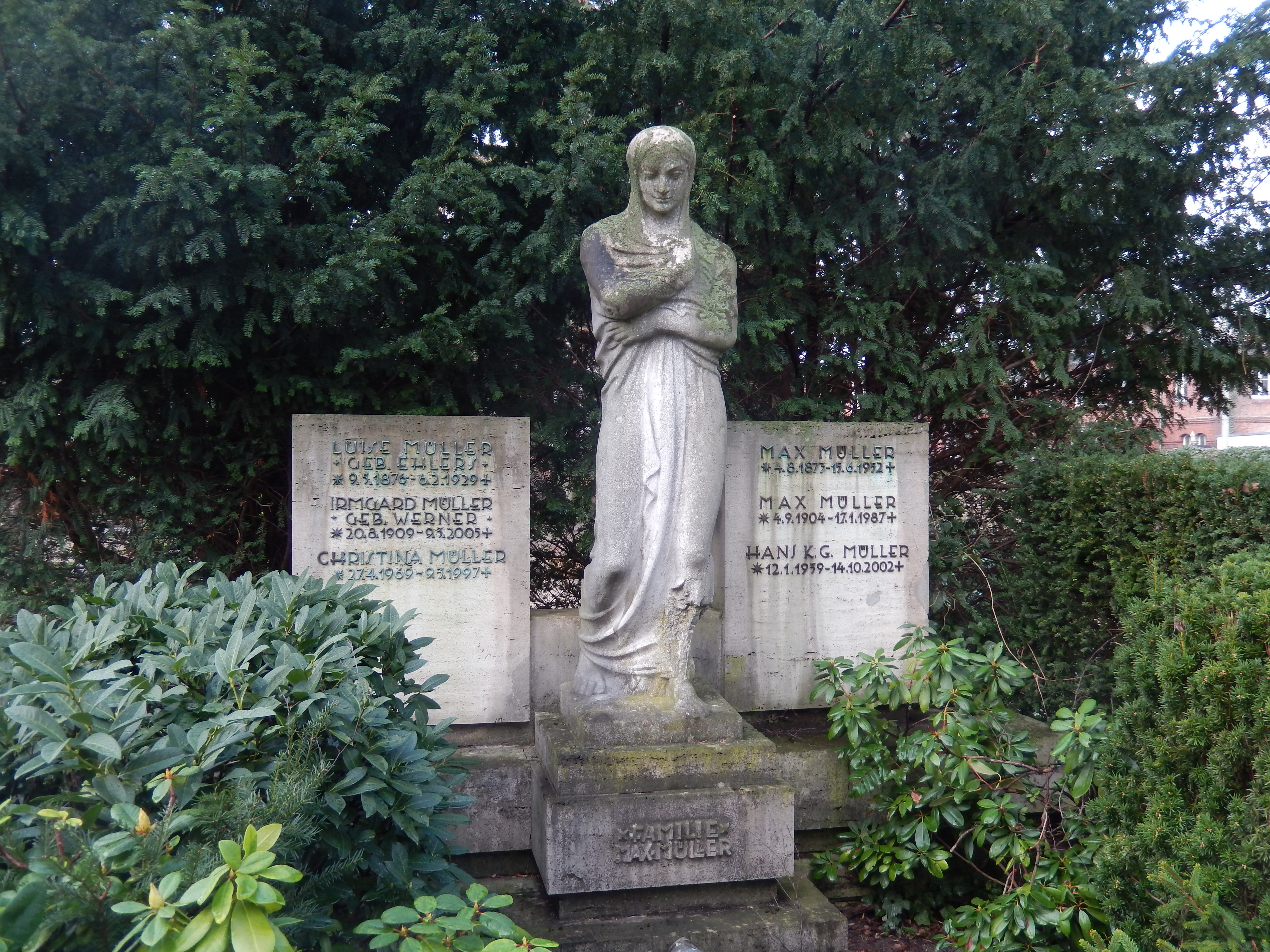 Max Müller II und III Grabstein